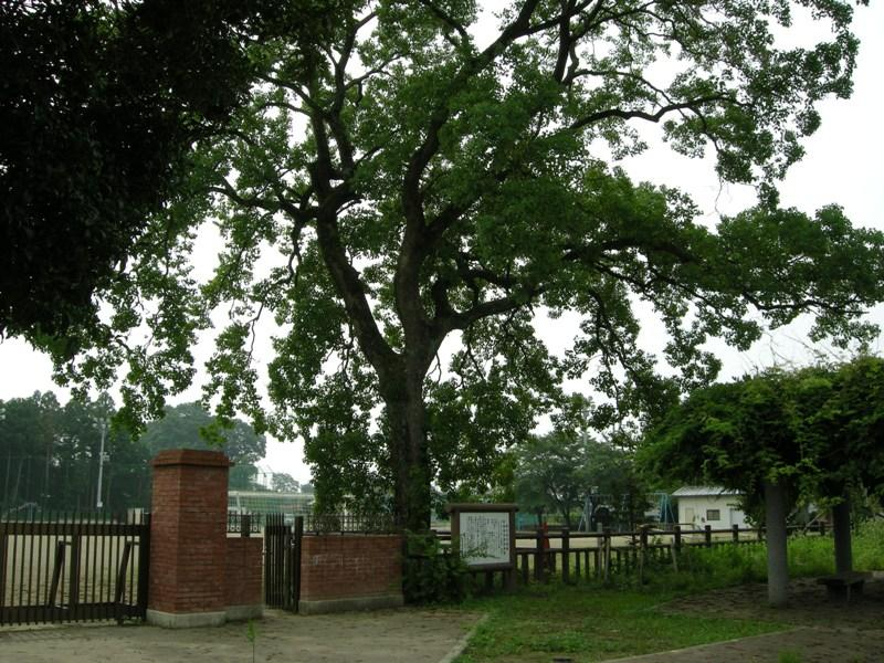 家中小ナンキンハゼ。